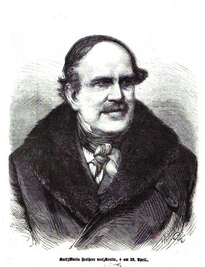 Porträt von Karl Maria von Aretin.